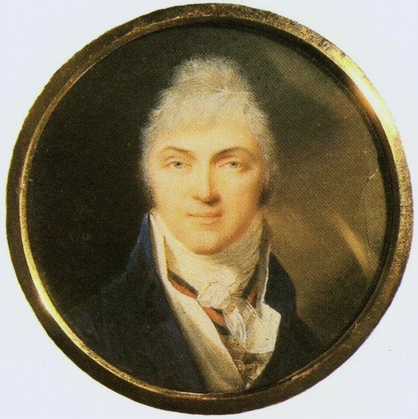 Михаил Иванович Комбурлей (1761–1821)